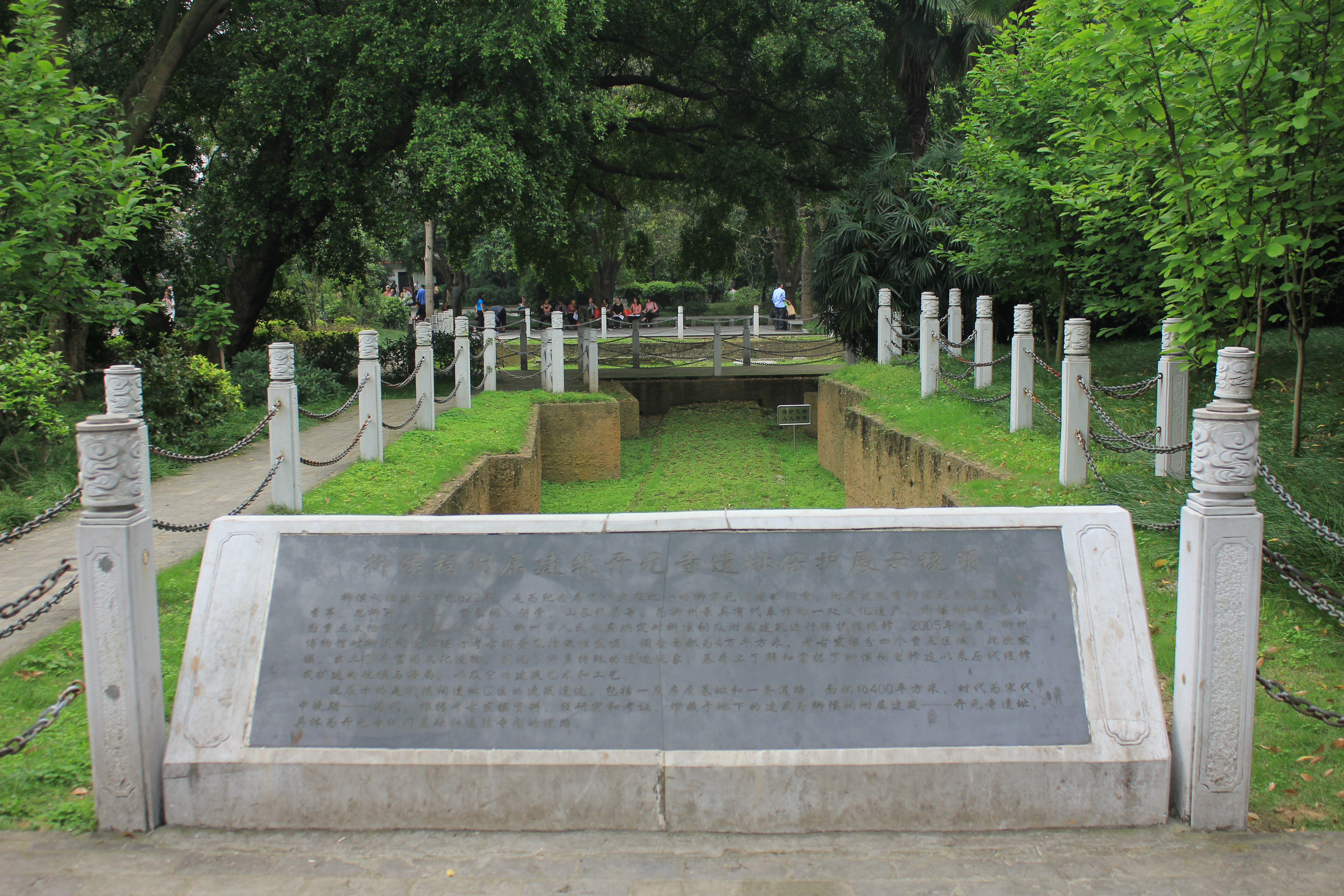 柳州市唐开元寺遗址